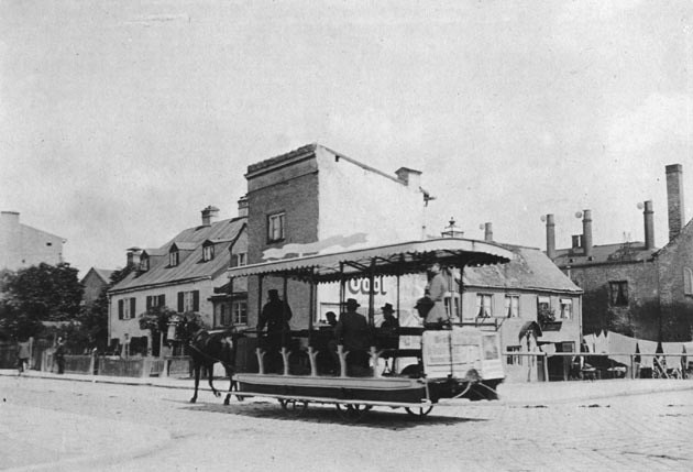 München, Pferdetrambahn in der Rosenheimer Straße an der Ecke zur Steinstraße. Die Schlote rechts im Bild gehören zum Gelände dees Bürgerbräukellers